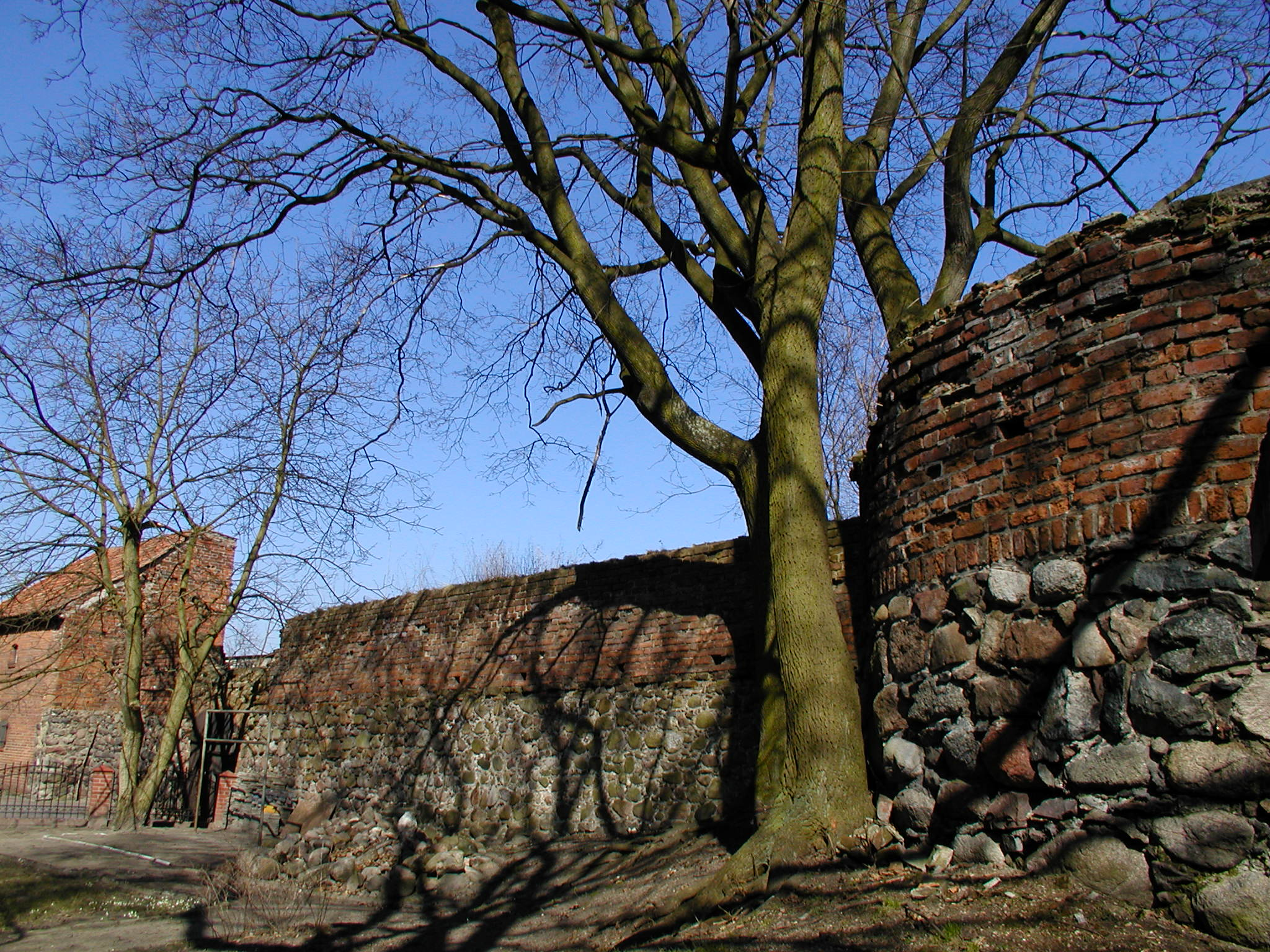 gotyckie miejskie mury obronne Nowe Miasto Lubawskie, Nowe Miasto Lubawskie (gmina miejska)